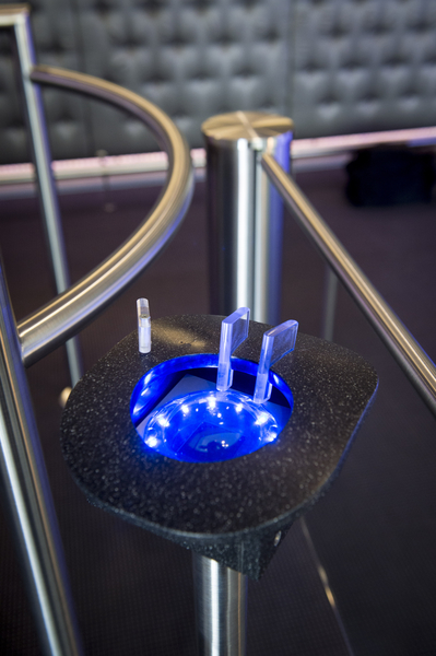 Handvenenscanner in der Spielbank Cottbus